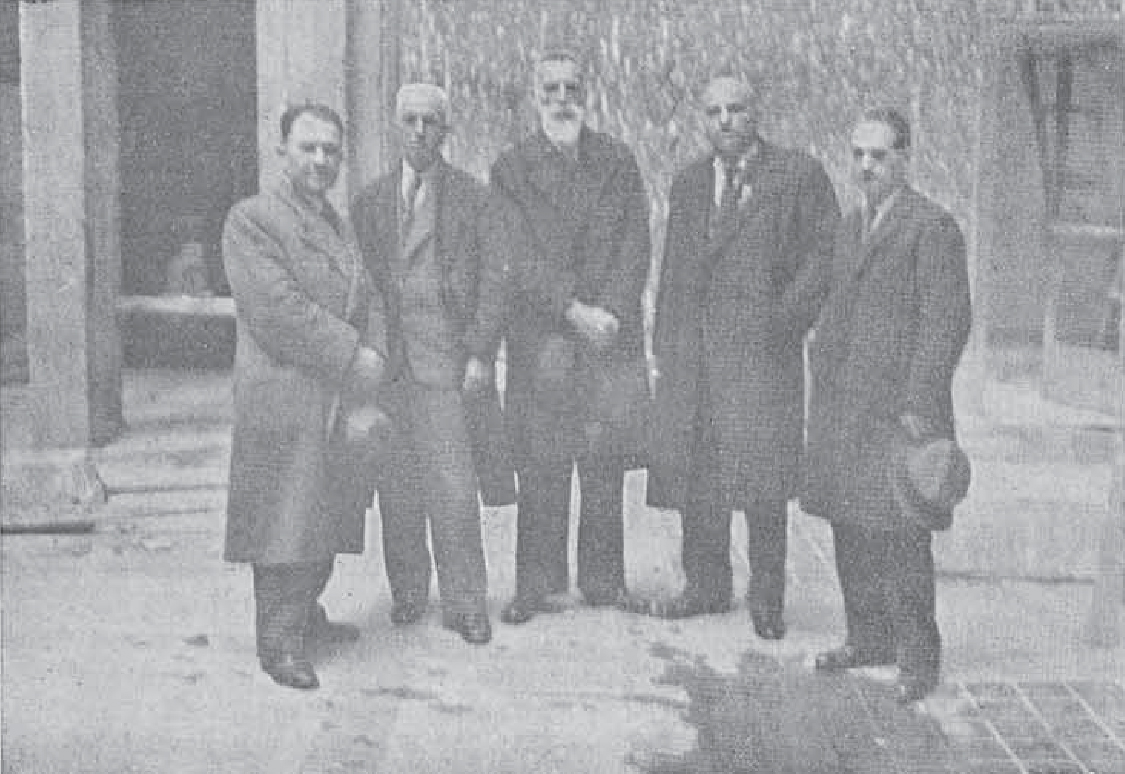 Ilinden organisation members